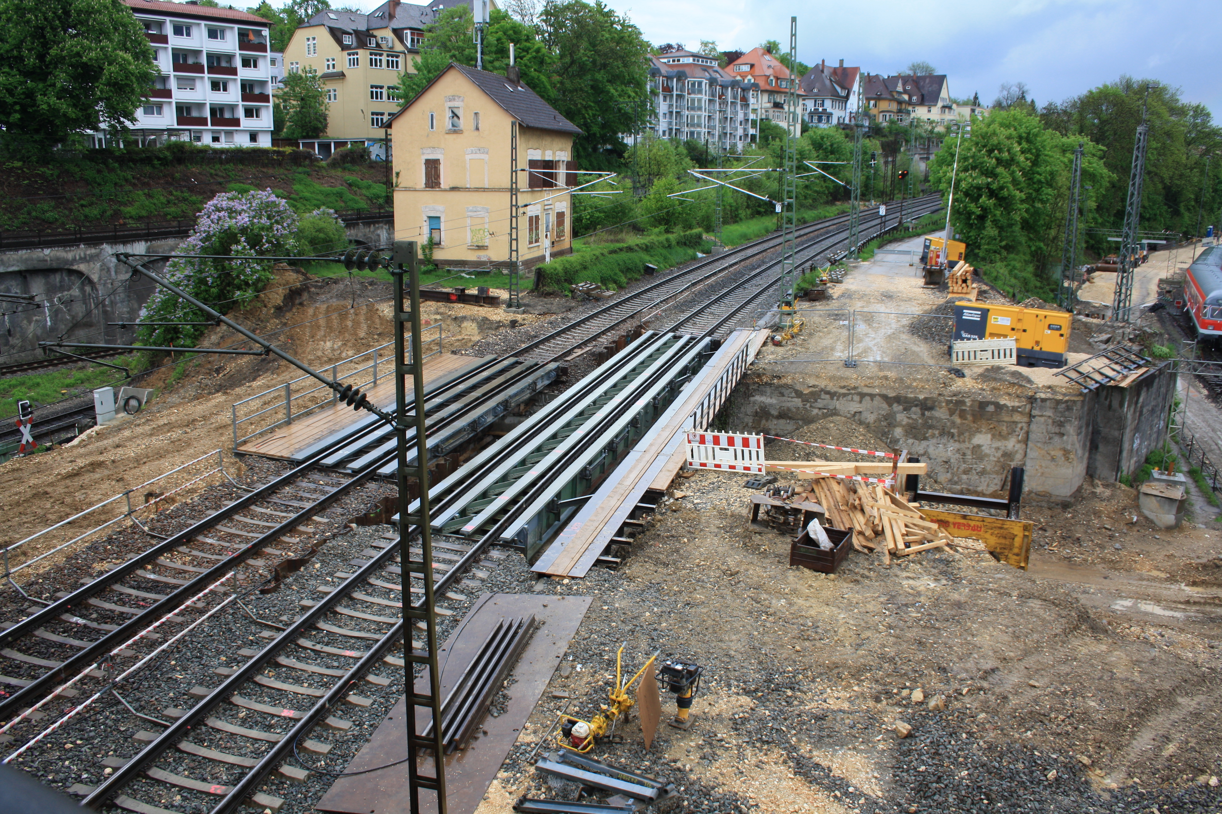 Hilfsbrücke an der Filstalbahn kurz vor dem Ulmer Hauptbahnhof. In der Nacht vom 11. auf den 12. Mai 2013 wurde die linke Brücke durch eine längere ersetzt. Diese Unterführung dient der Baustellenzufahrt des Albabstiegstunnel (PFA 2.4) und nach Inbetriebnahme der Neubaustrecke Wendlingen–Ulm als Rettungszufahrt.